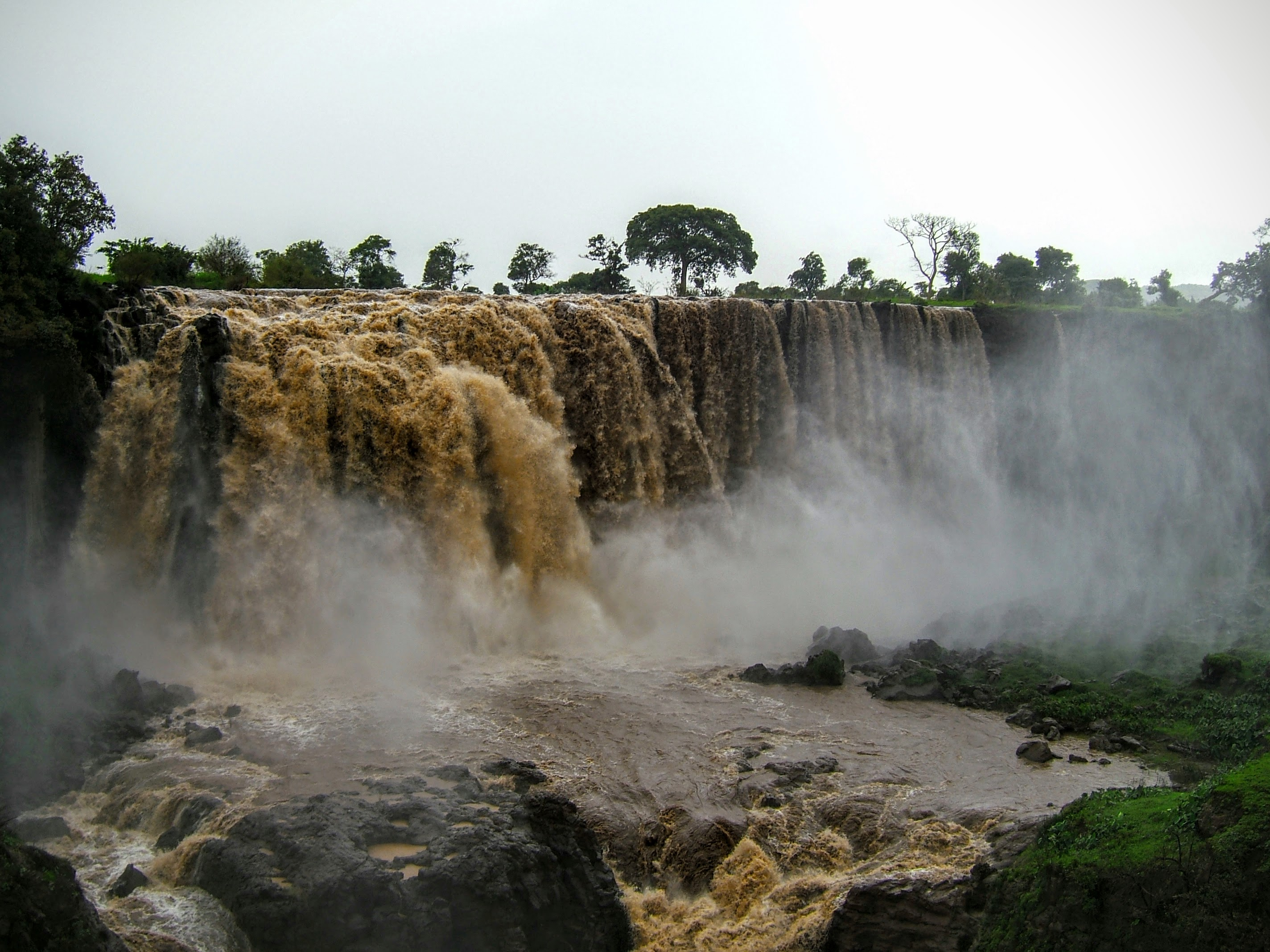 Blue Nile Falls